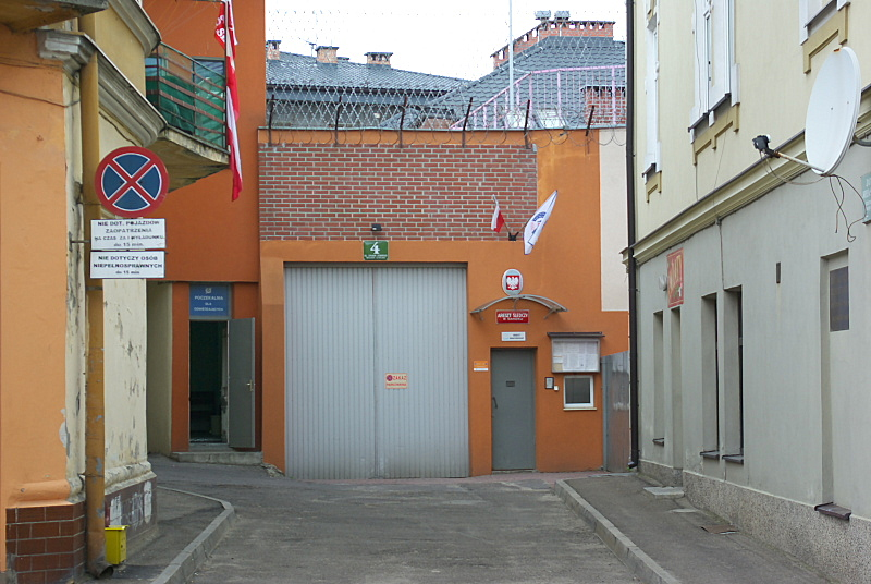 zaułek Józefa Szwejka Sanok